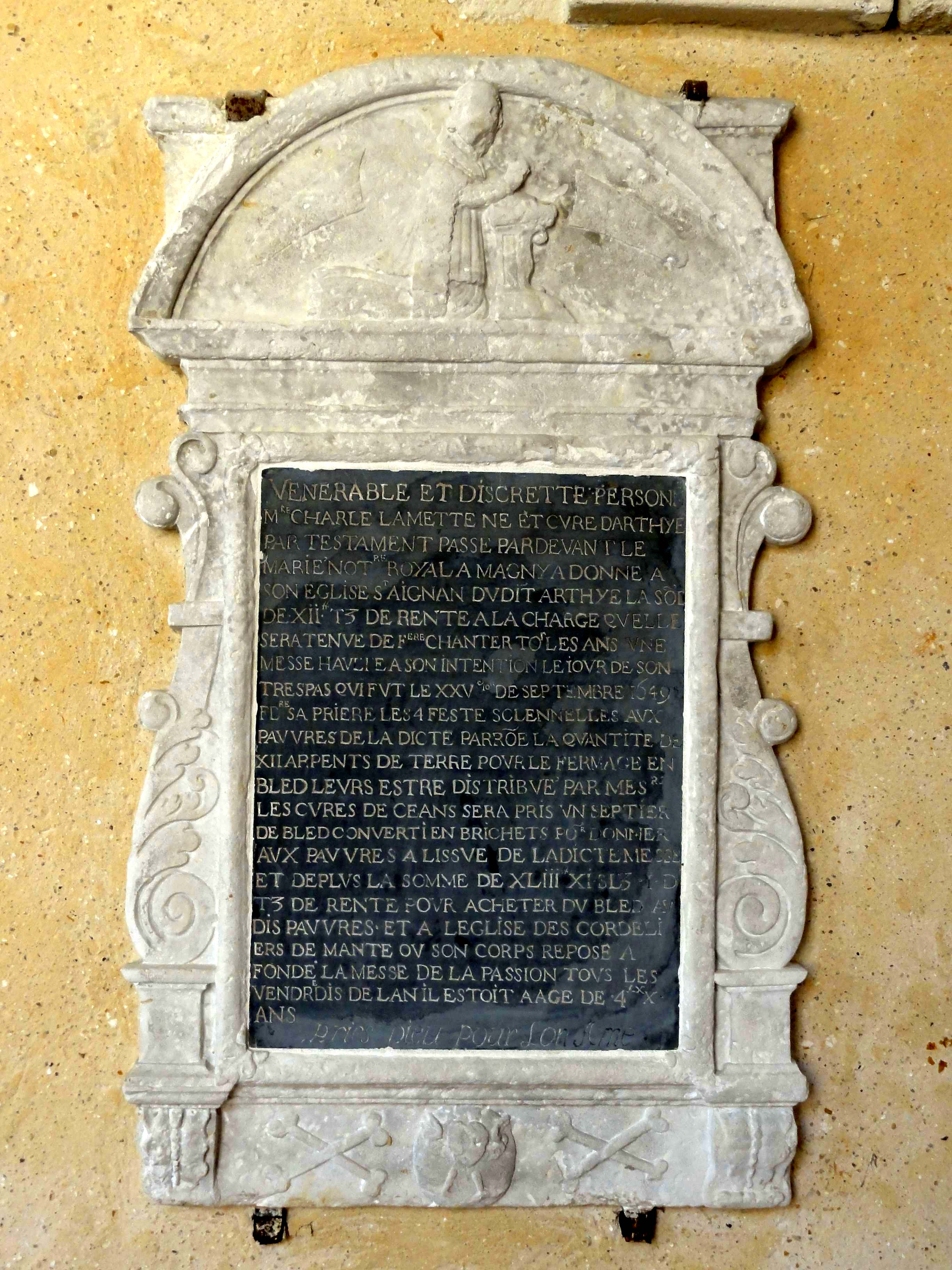 Mobilier de l'église (voir titre).